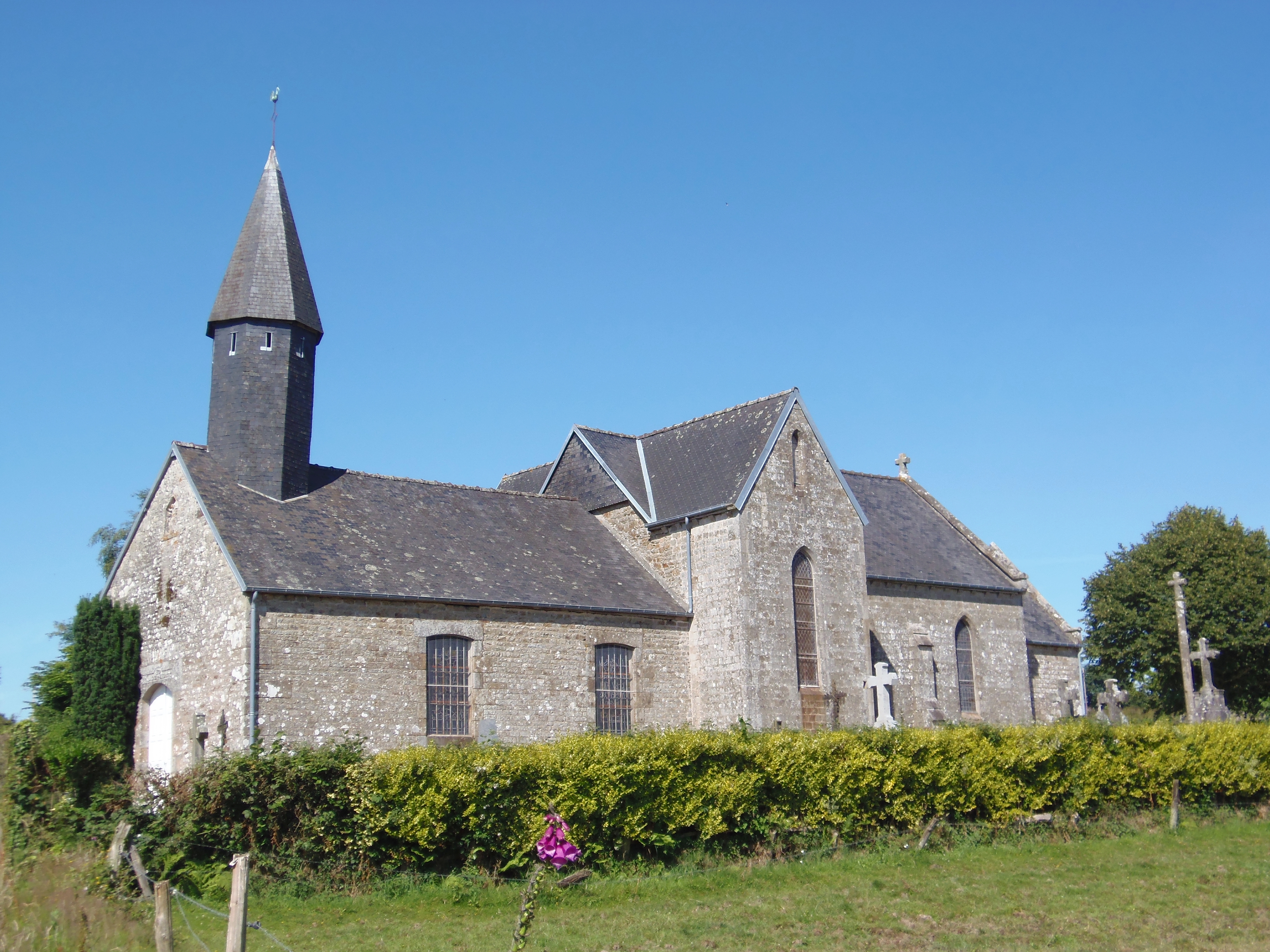 Lingeard (Normandie, France). L'église Saint-Sauveur.